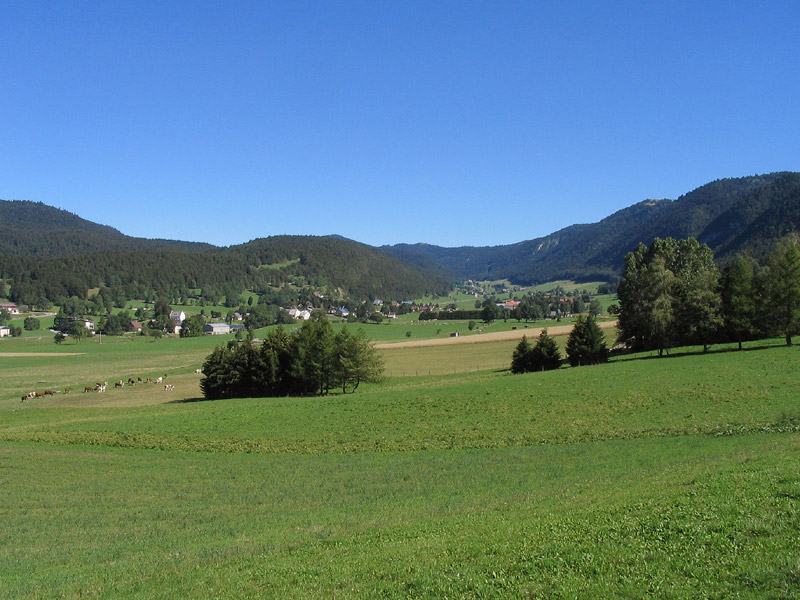 Paysage des quatre montagnes, vers Autrans Auteur